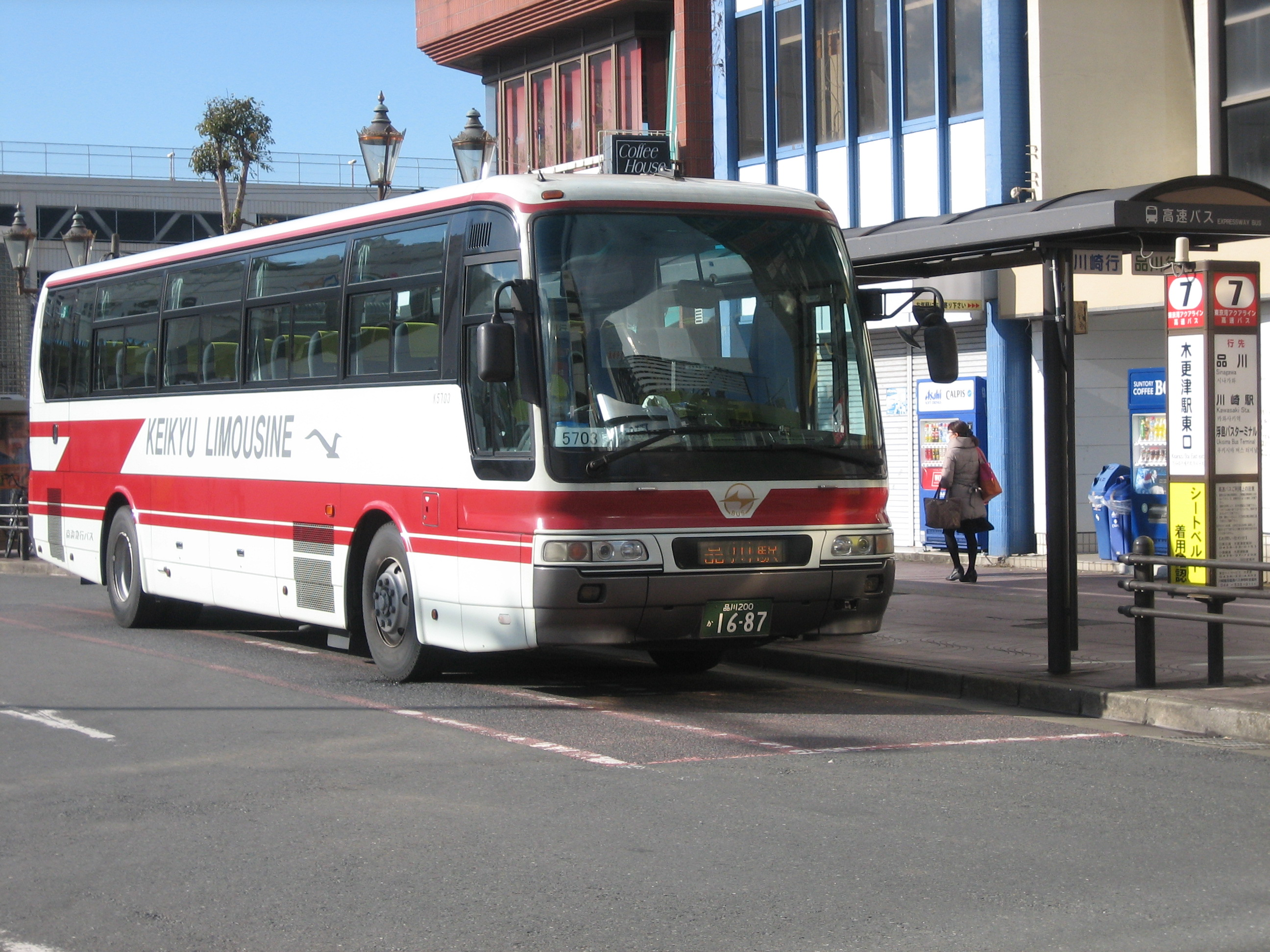 木更津駅東口7番のりばに停車中の品川駅東口行の高速バス。